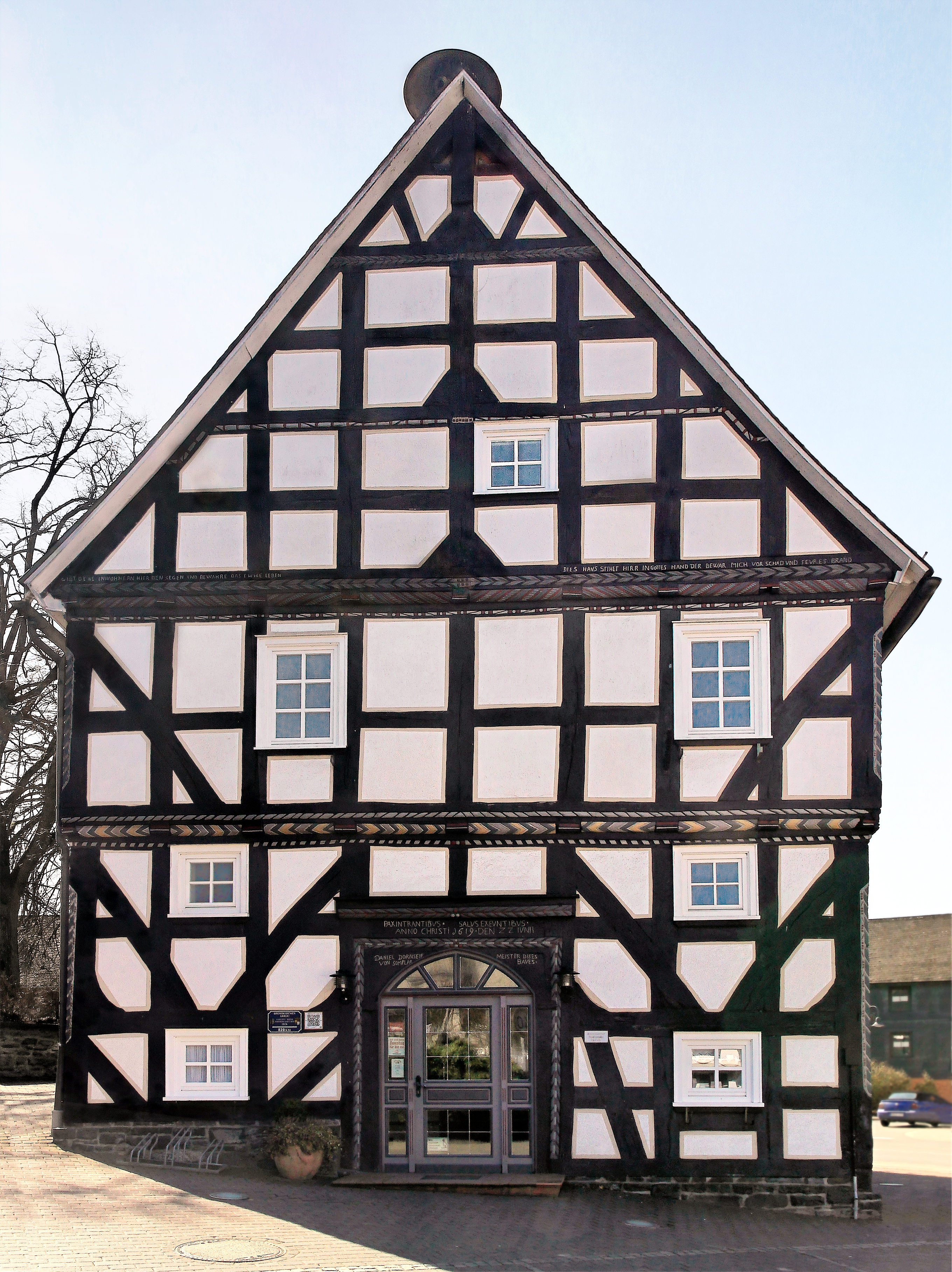 Rathaus Bromskirchen (Hessen, Deutschland)